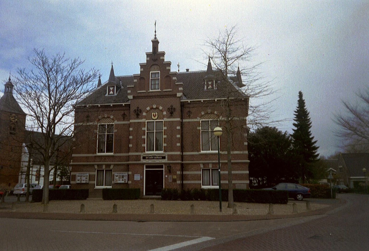 Voormalig raadhuis, Langstraat 2, Bunnik. Ten tijde van de foto was dit in gebruik als kantoor. Uiterst links de Hervormde kerk. Foto genomen op 11 april 2004 en geupload door maker.